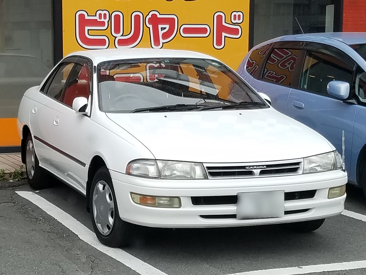 カリーナ SX(後期型)